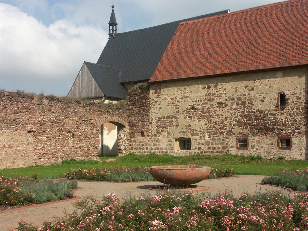 Kloster Buch: Der Bereich des ehemaligen Kreuzgangs mit Kapitelhaus und Mauer der ehemaligen Klosterkirche